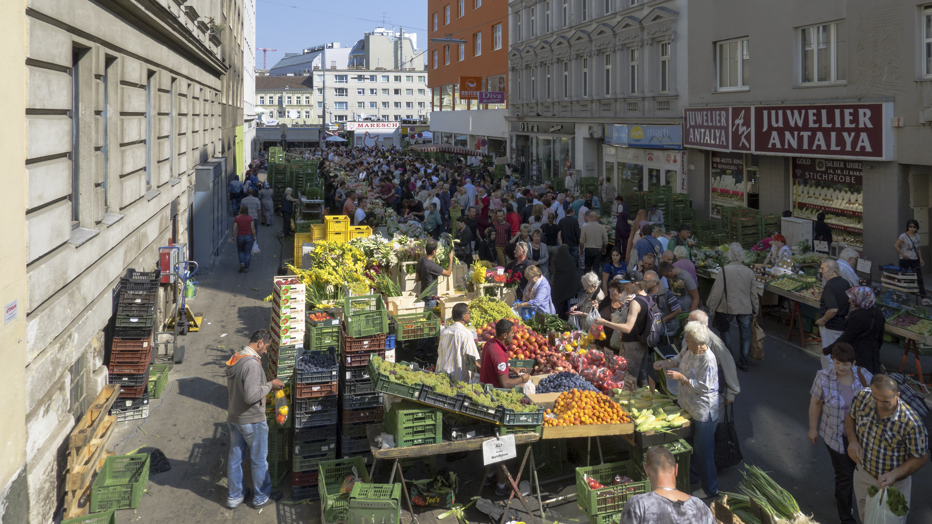 Viktor-Adler-Platz in Wien 10 bei der Leibnitzgasse Nr. 8 Richtung Norden